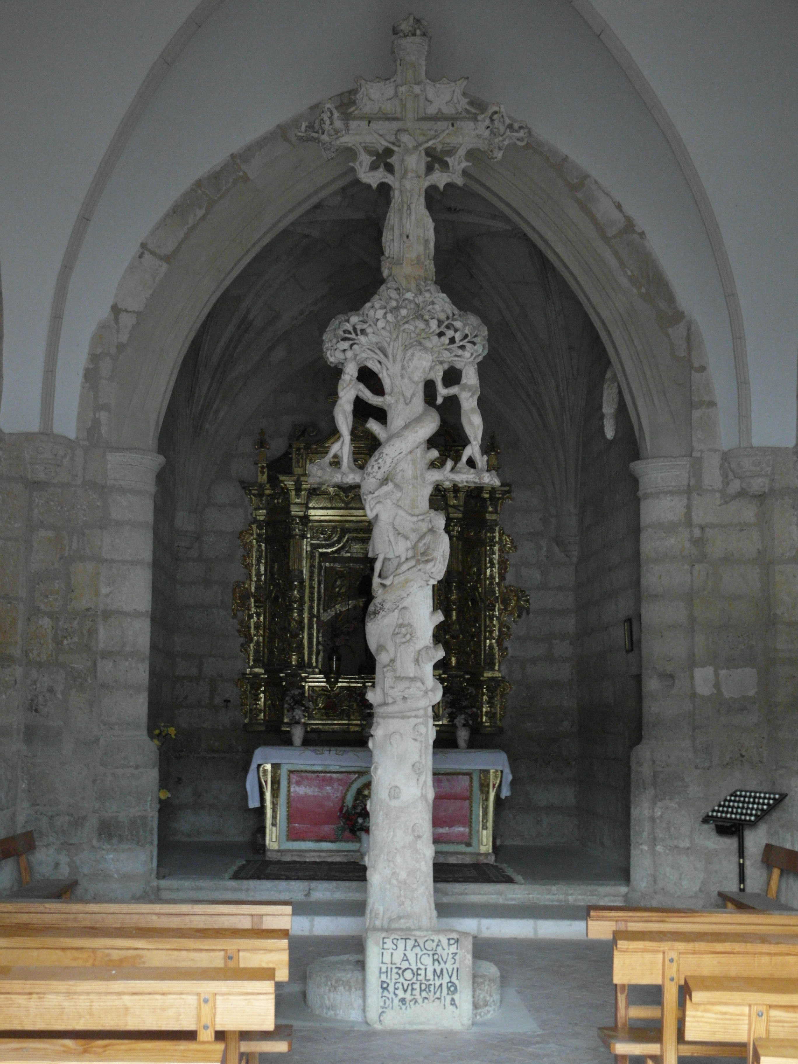 Sasamón, Burgos.